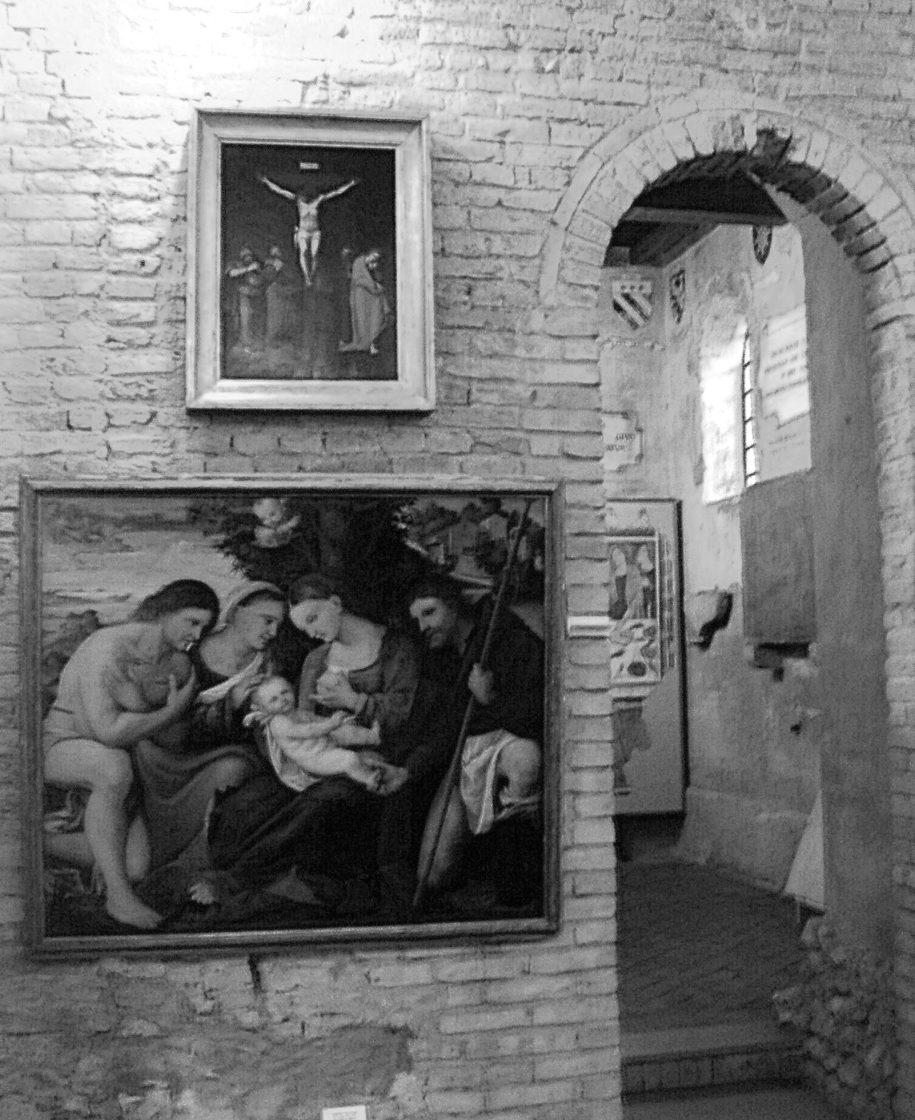 Conegliano (Treviso): interno della pinacoteca del Museo civico di Conegliano, con sede nella torre superstite del castello medievale.